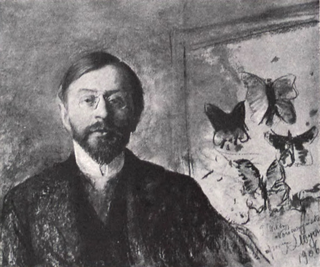 Adolf Nowaczyński (1876-1944)